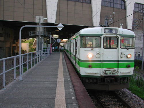 燕三条駅・弥彦線ホーム